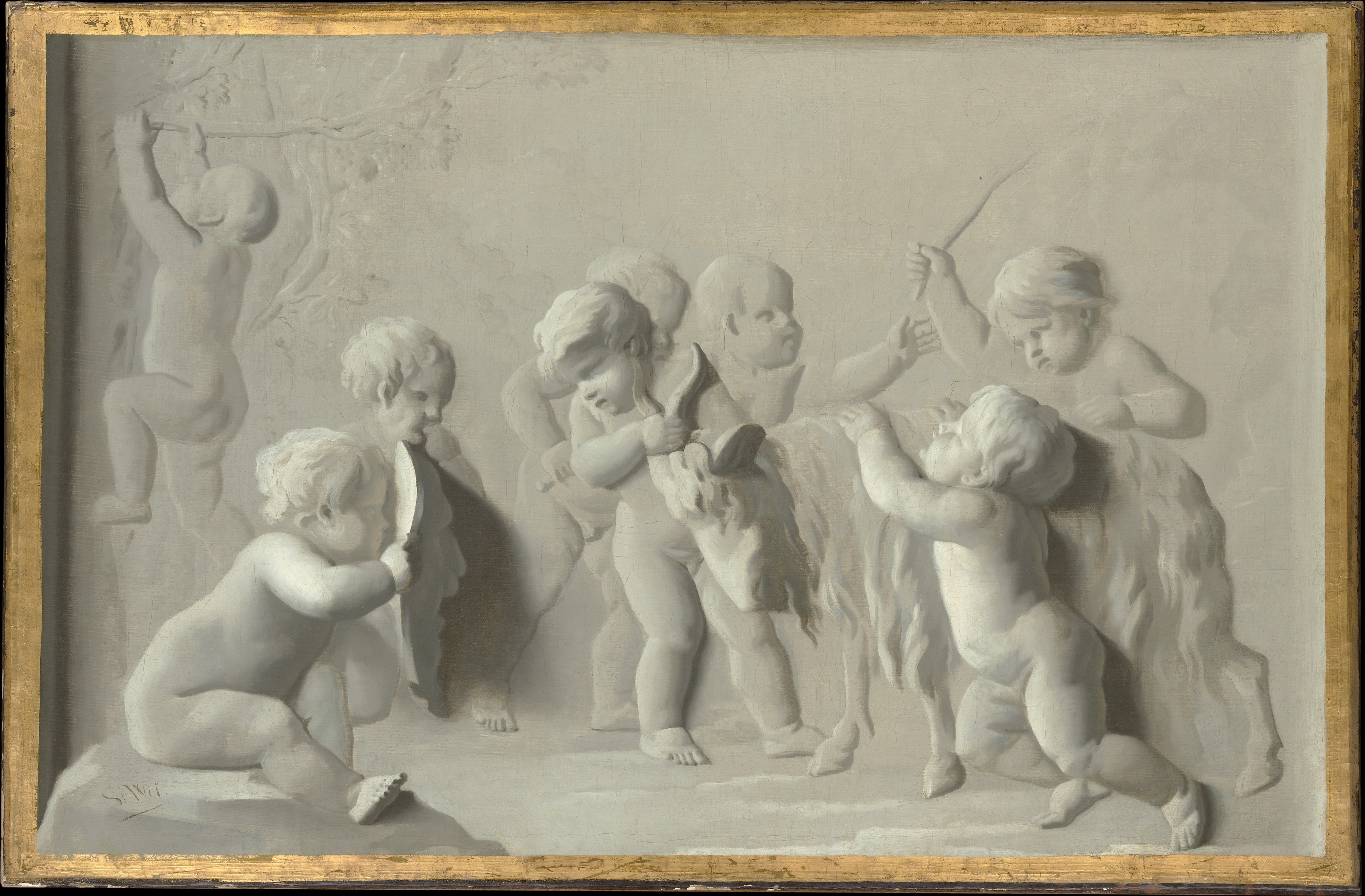 Painting, grisaille; Paintings